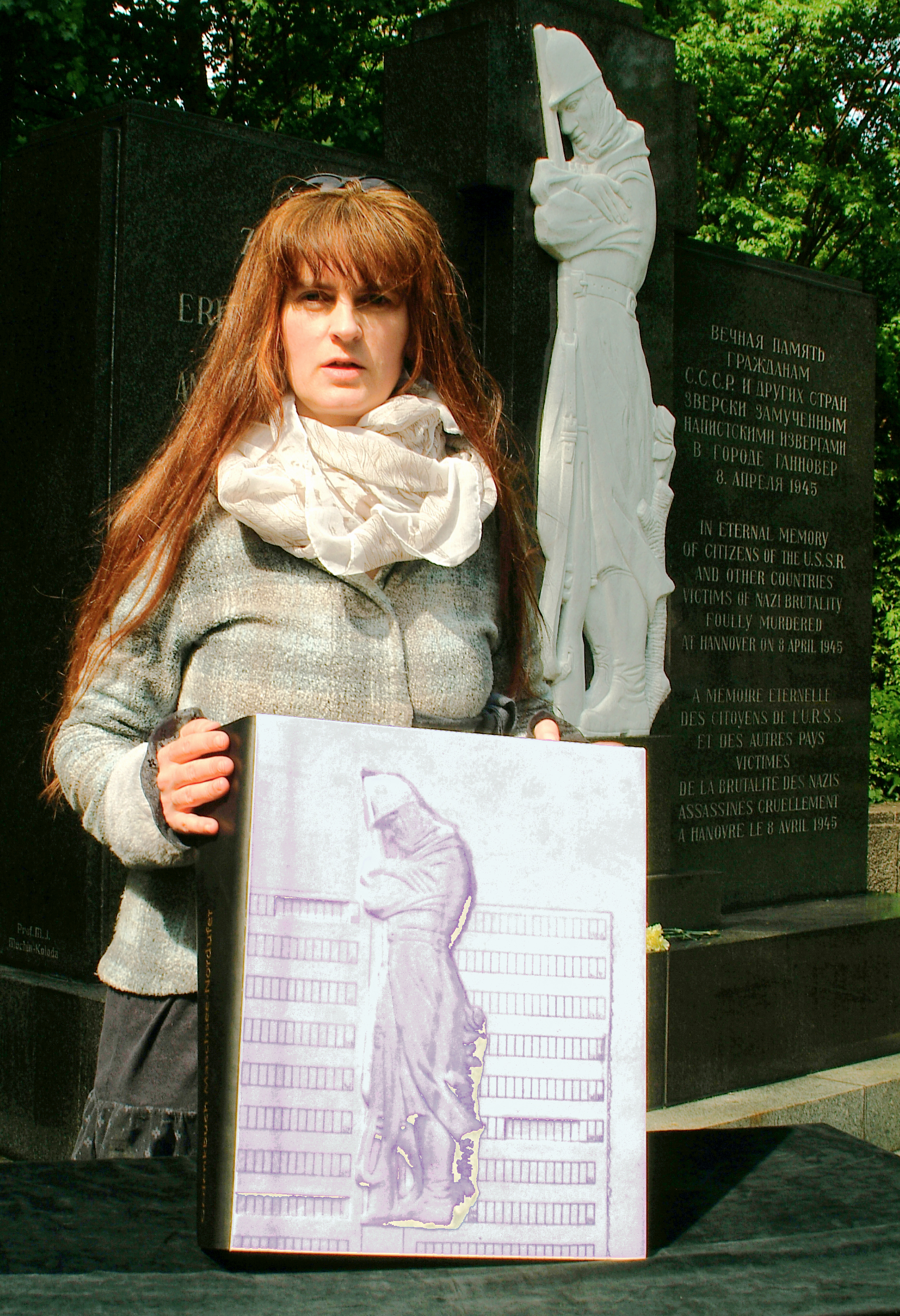 Janet Freifrau von Stillfried vor dem Denkmal auf dem Ehrenfriedhof am Maschsee-Nordufer in Hannover mit dem von ihr begonnenen Gedenkbuch: Unter dem Arbeitstitel "Eine Seite, ein Name, ein Schicksal hat die Historikerin bisher 161 von 386 Namen der 1945 Ermordeten identifizieren können.